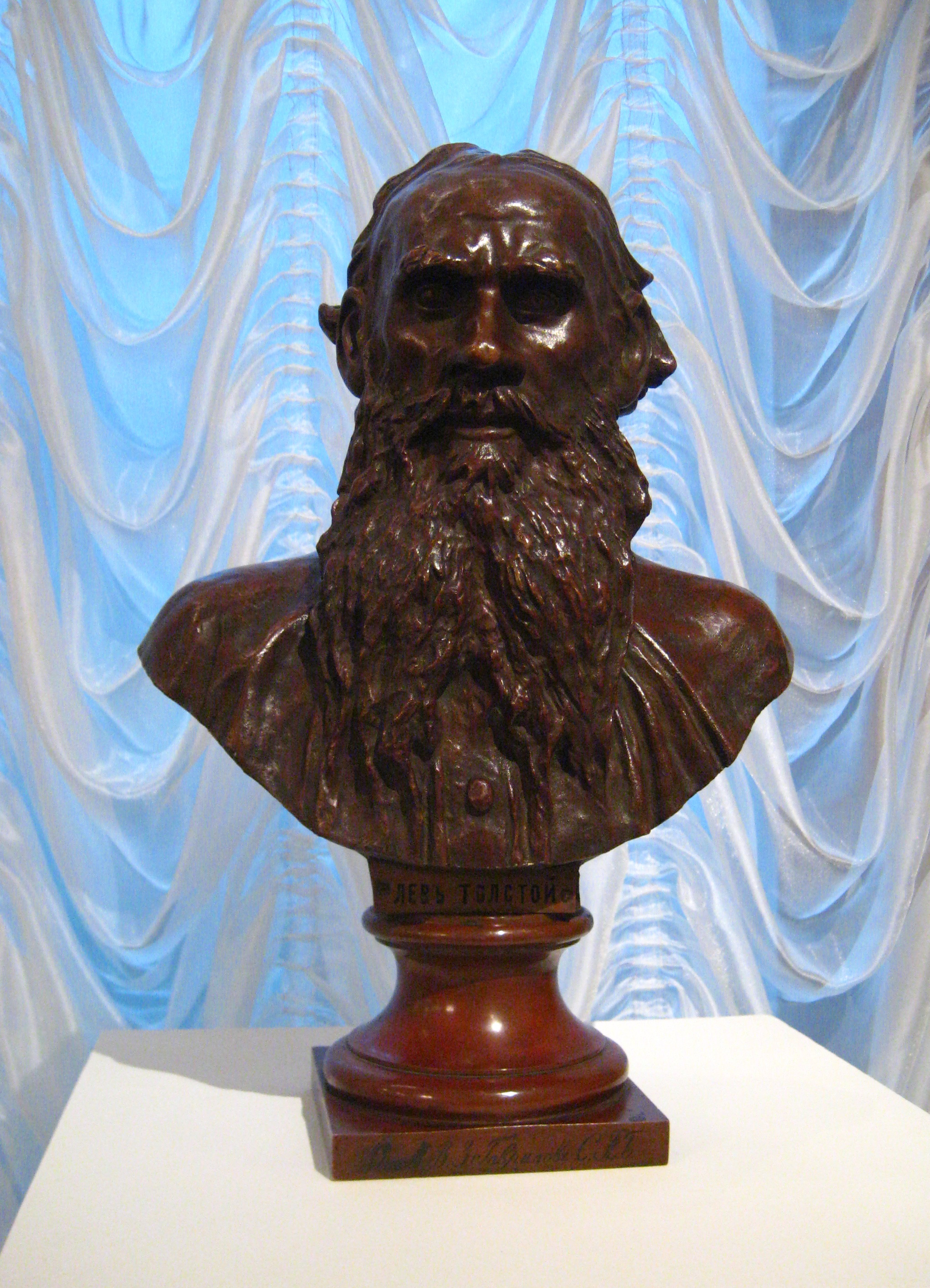 Н.Н. Ге. "Л.Н. Толстой". 1890. Бюст на круглом плинте с четырехугольным пьедесталом. Отлив В.З. Гаврилова, СПб. Бронза